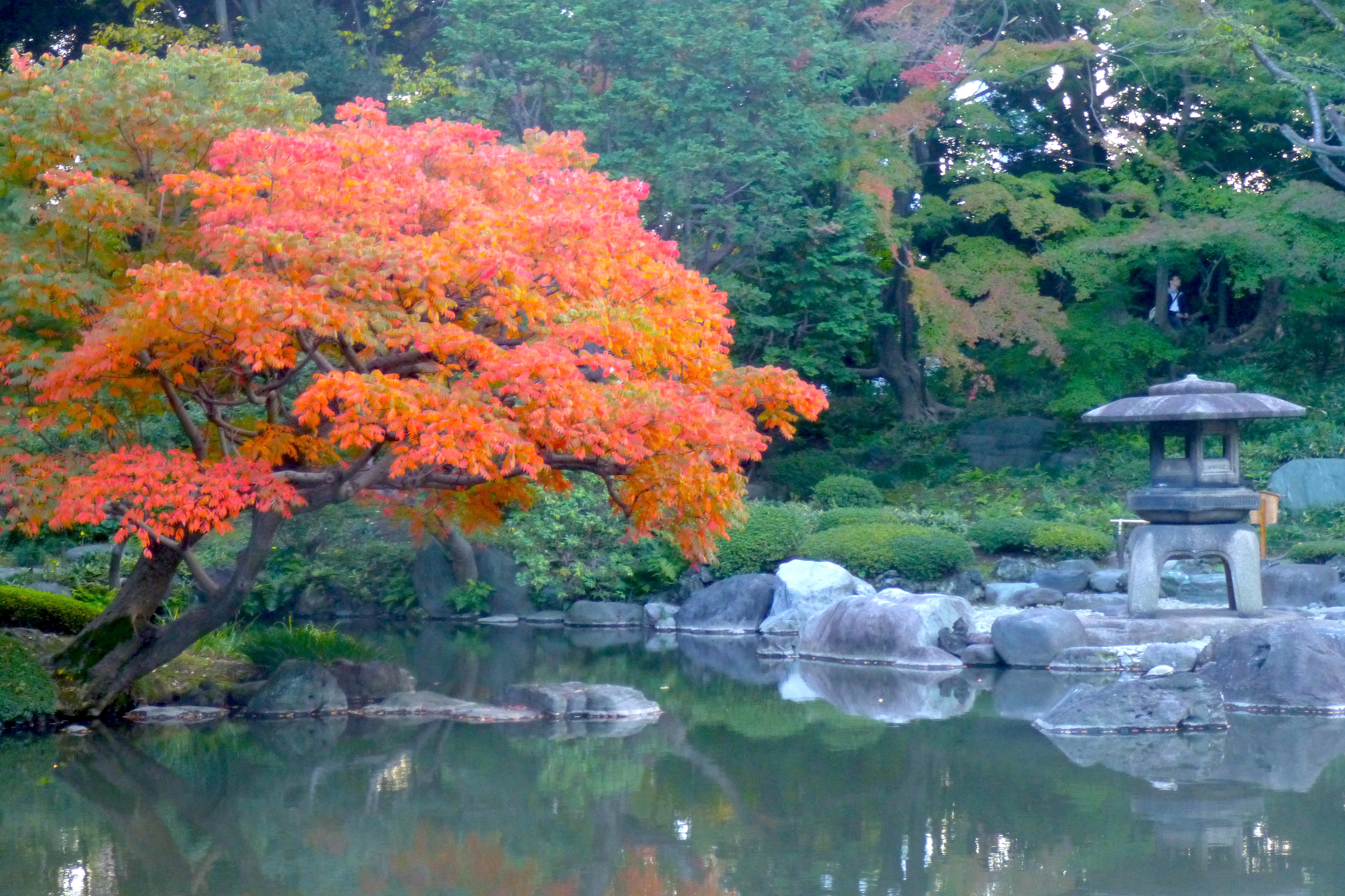 Kyu-Furukawa Gardens, fall foilage (旧古河庭園の紅葉)